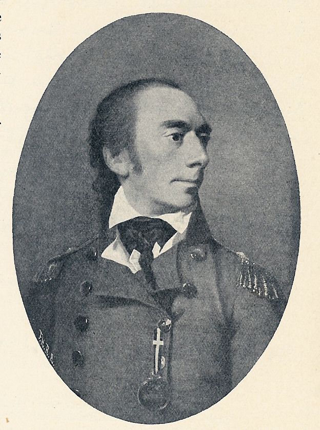 Søofficer Lorentz Fjelderup Lassen. 1756-1837. Painting in the Frederiksborg Museum.